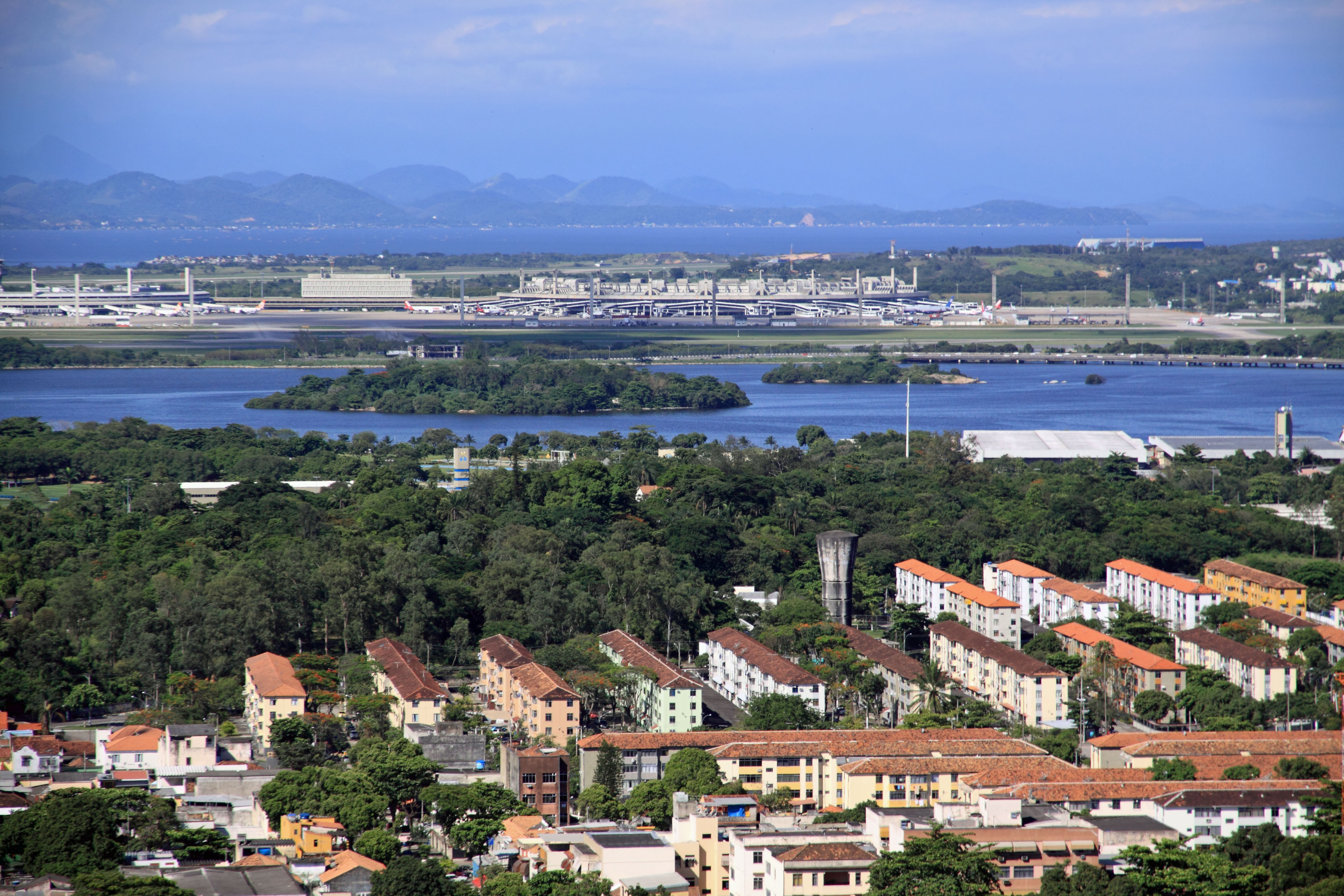 No Canal do Fundão são vistas as Ilhas do Raimundo e Santa Rosa. O mapa de Albernaz de 1666 chama de Ilha da Pedra sendo a referência para o Engenho da Pedra. Hoje estão na frente da Área de Proteção Ambiental da Fazendinha da Pedra.